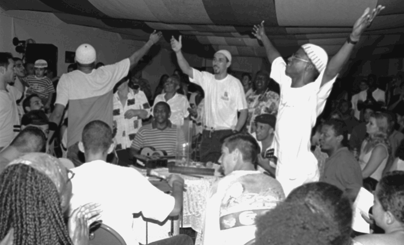 Chapinha, Maurilio de Oliveira, Paquer, Magnu Sousá